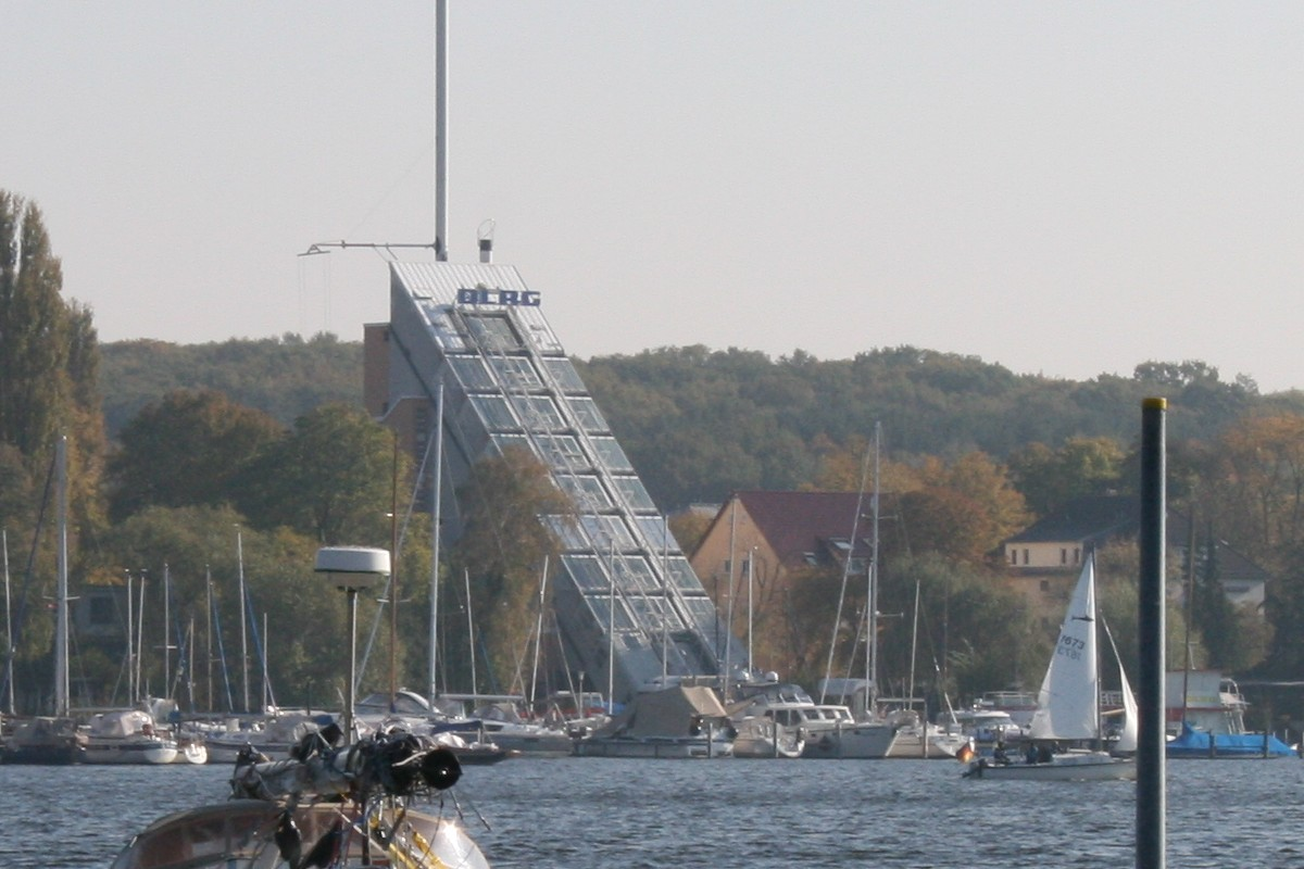 Berlin-Spandau Am Pichelssee 20–21